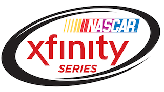 引用